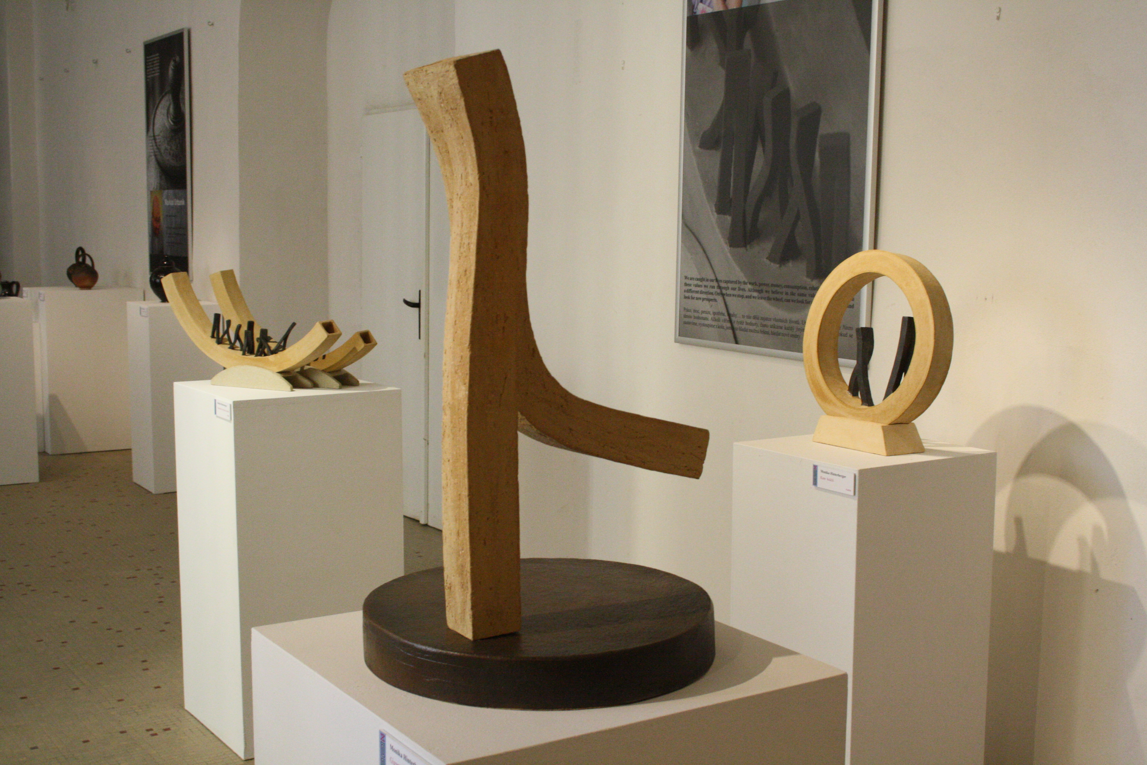 Monika Hinterbergers "Läuferin" steht im Keramik-Museum in Bechyne (CZE)